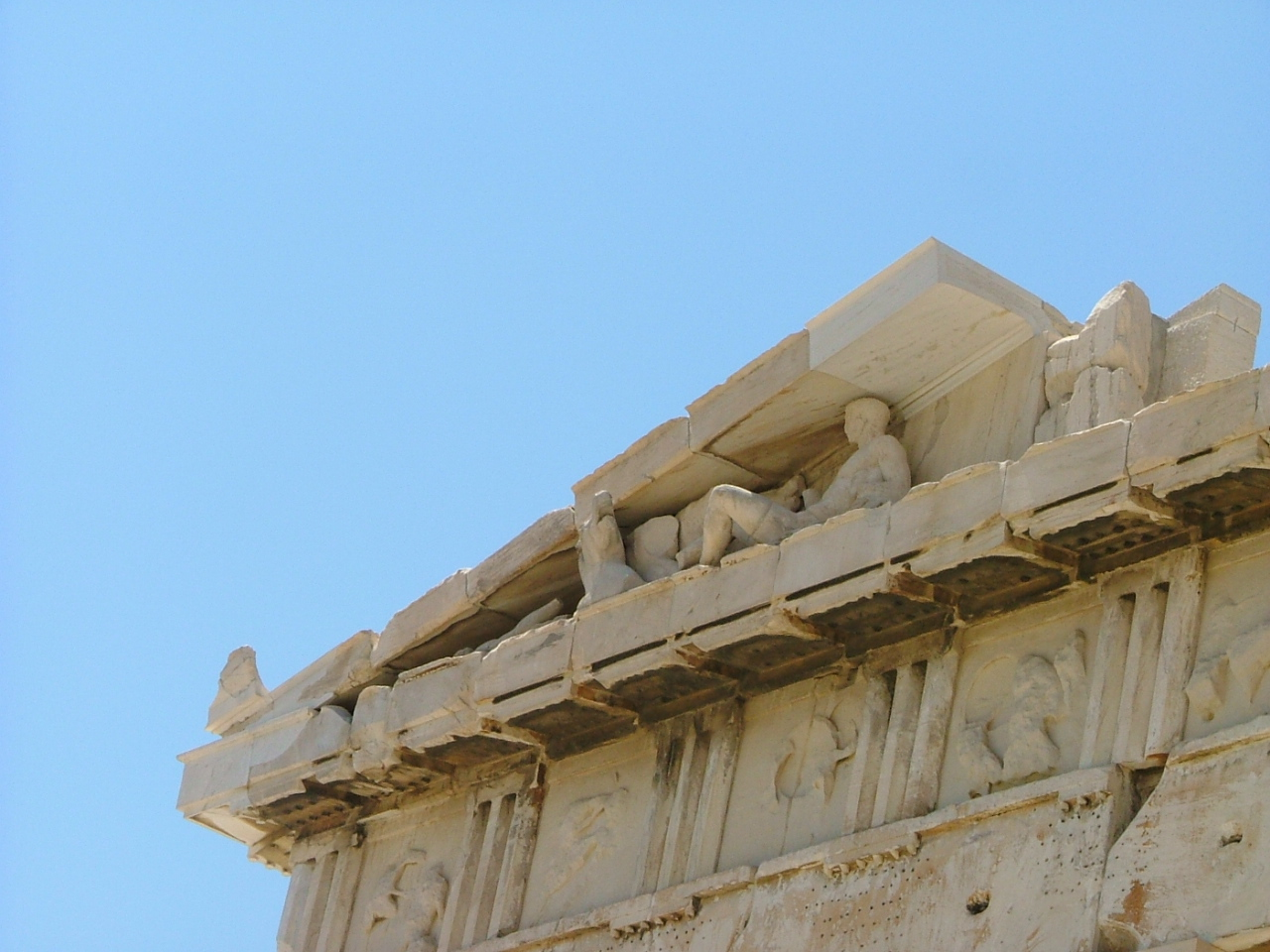 El Partenón (del griego Παρθενος Parthenos -Virgen-; uno de los adjetivos que servían de sobrenombre a Atenea) es el templo griego de orden dórico, situado en la Acrópolis de Atenas dedicado a Atenea Partenos. De mármol blanco del monte Pentélico, fue iniciado por Pericles y se desarrolló entre los años 447 y 432 a. C. Los arquitectos encargados de la obra fueron Ictino y Calícrates y estuvieron bajo las órdenes del famoso escultor ateniense Fidias.